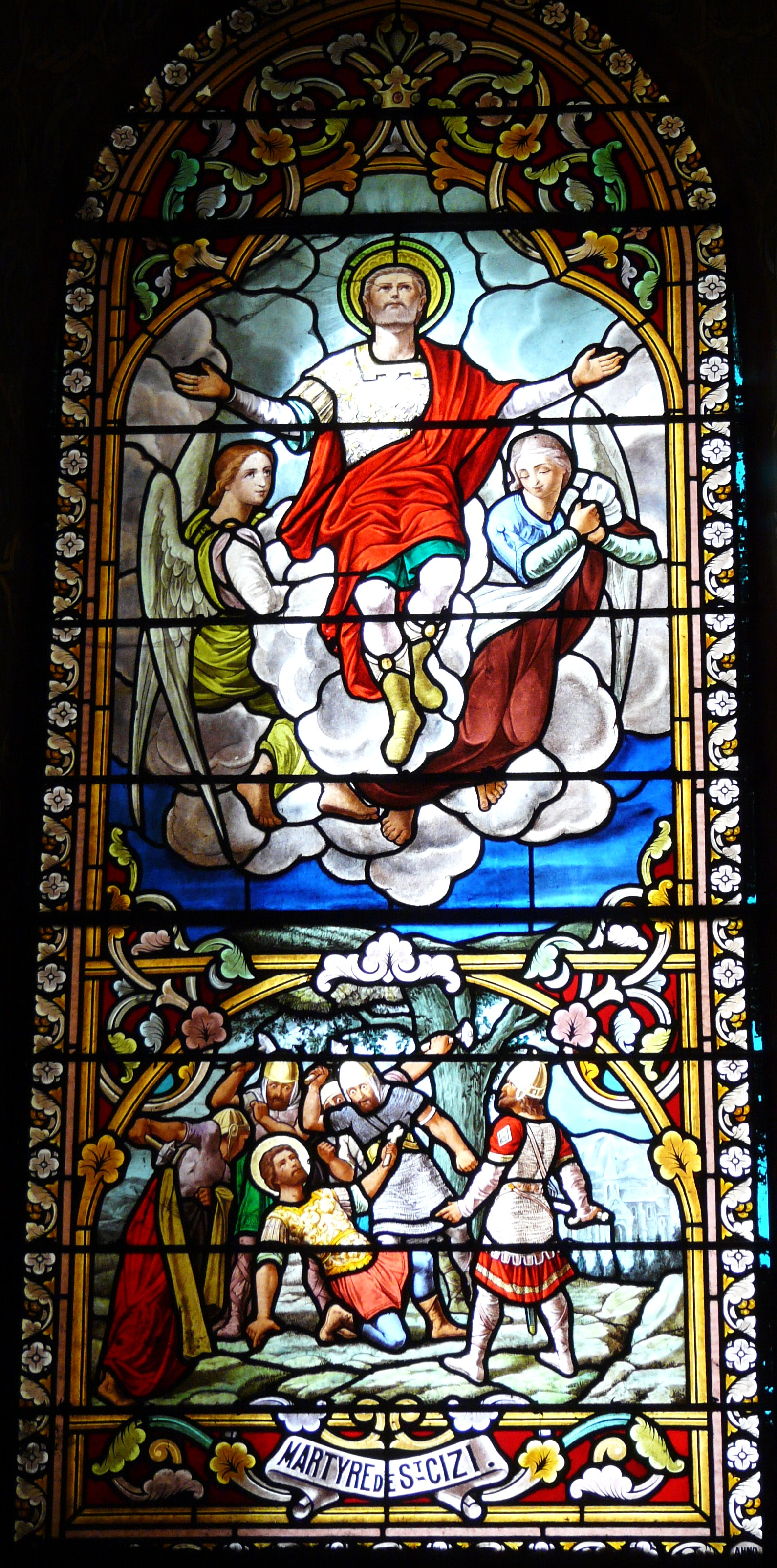 Vitrail représentant le martyre de saint Cizy, ancienne cathédrale de Rieux, Rieux-Volvestre, Haute-Garonne, France.